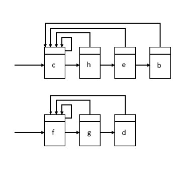 Представяне на множества {c, h, e, b}и {f, g, d} в свързани списъци.